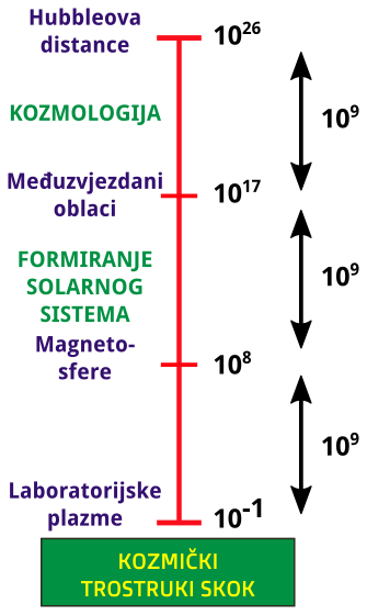 Hannes Alfvén je predložio da se skaliranja laboratorijskih rezultata mogu ekstrapolirati sve do razmjera svemira. Da bi se ekstrapolacijom dosegla magnetosfera, bilo je potrebno izvesti skaliranje reda veličine 109. Sljedećom identičnom ekstrapolacijom došlo se do galaktičkih uvjeta. Trećom ekstrapolacijom dosegla se Hubbleova udaljenost